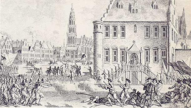 Het 'Verraad van Rennenberg' op 3 maart 1580 te Groningen.